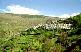 Vista de Capileira (Granada-España)